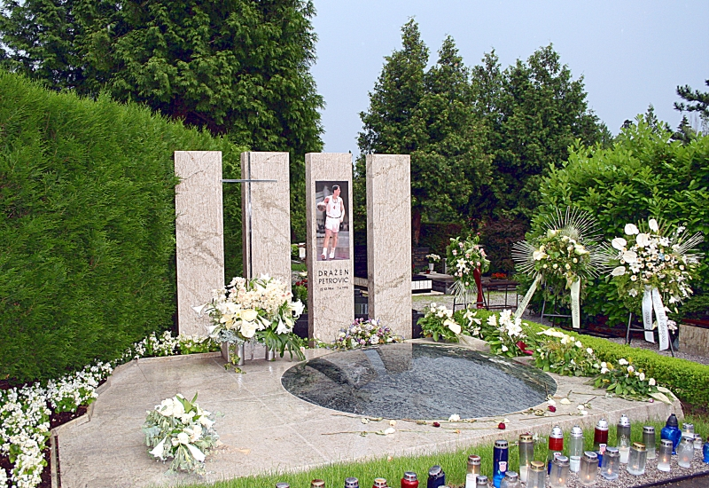 Grob Dražena Petrovića na Mirogoju u Zagrebu